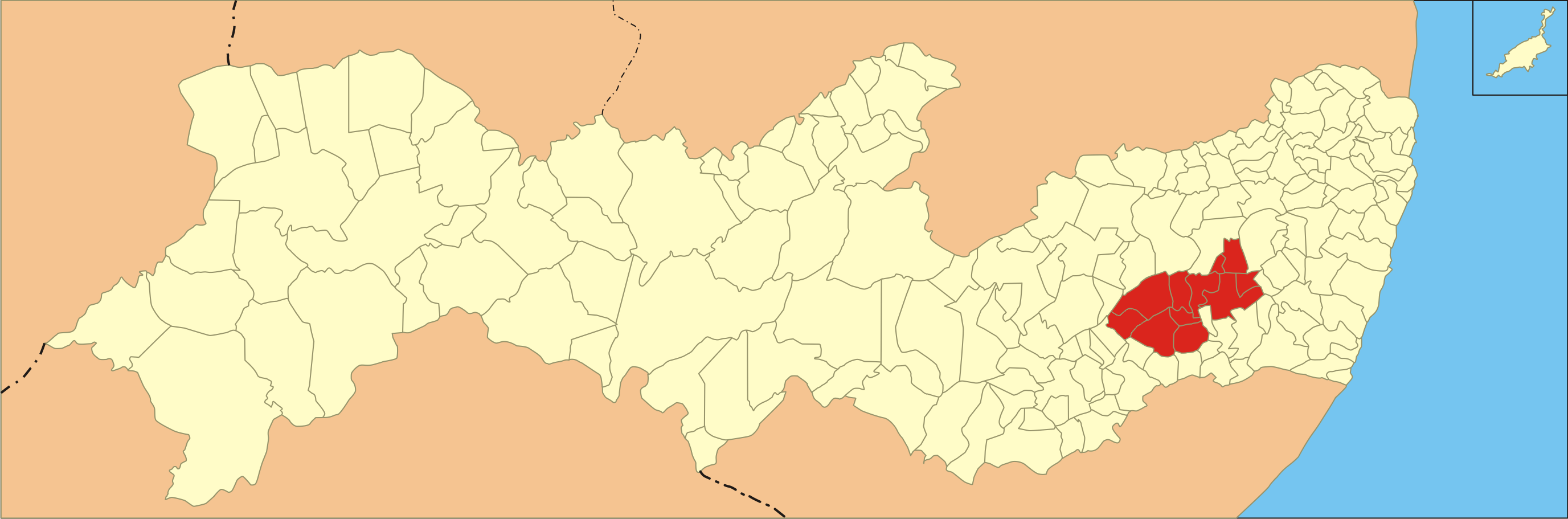 Localização da microrregião no estado de Pernambuco.